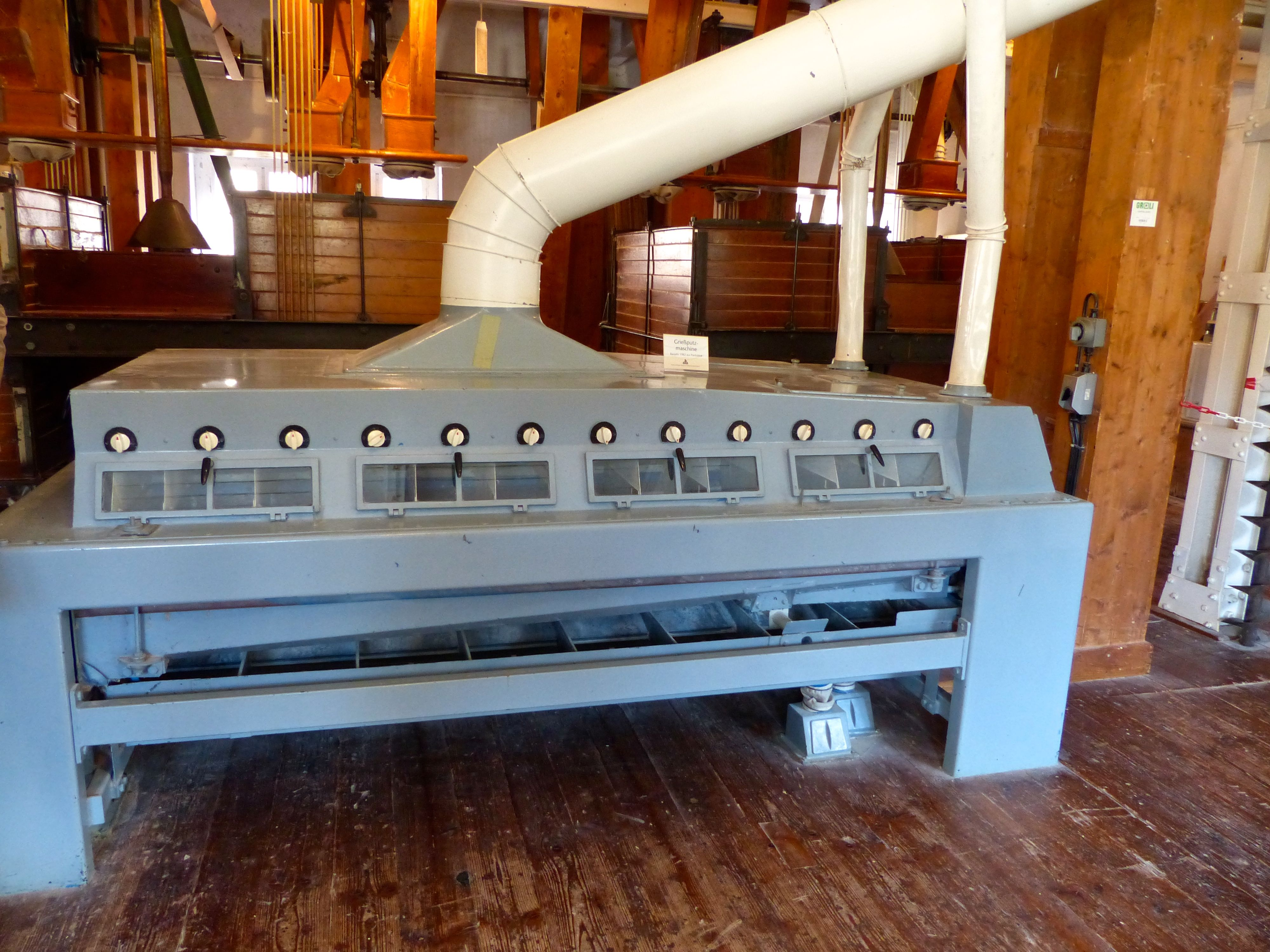 Getreidemühle Bärenhecke: Griesputzmaschine